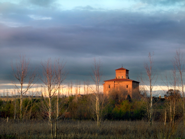 La «Casa Blanca». Palacete campestre de Medina del Campo construida por el potentado Don Rodrigo de Dueñas en el siglo XVI (provincia de Valladolid, España)